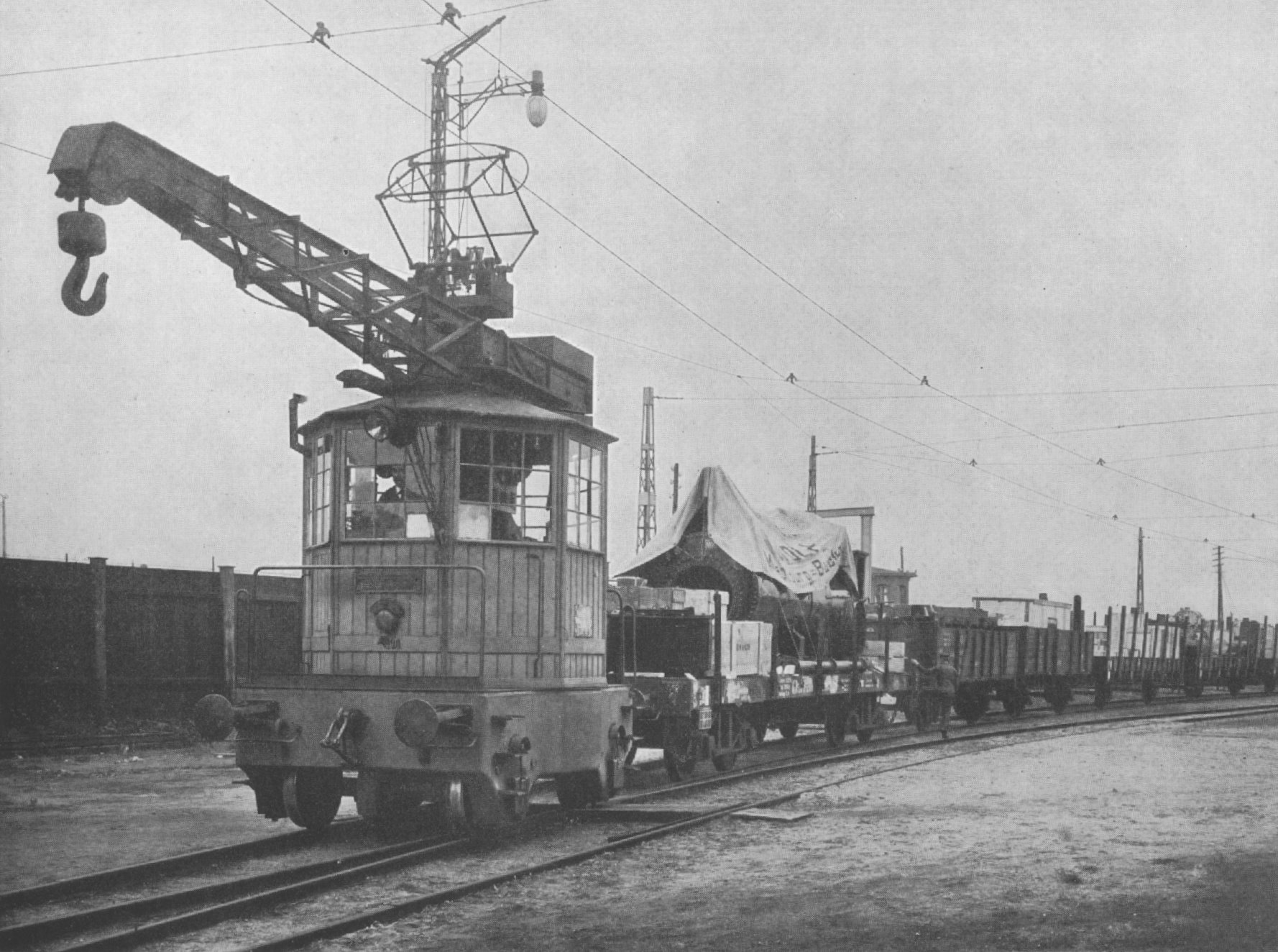 „Elektrische Kranlokomotive für Transporte auf dem Fabrikgrundstück und für den Anschluss an die Staatsbahn“ (Originalbeschreibung)